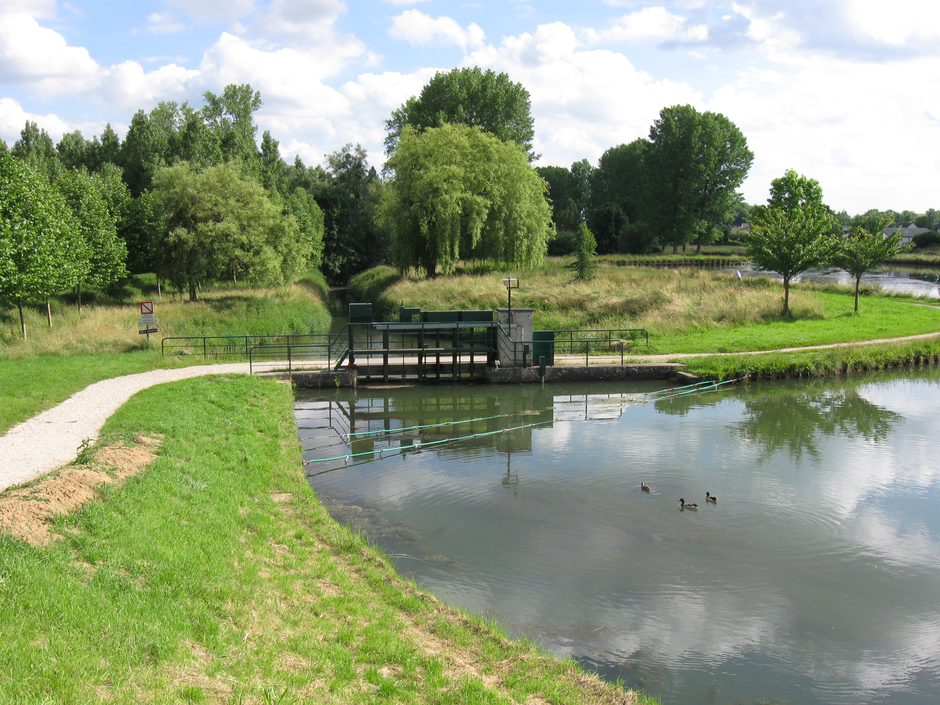 La rivière l'Ourcq continue en face et début du canal de l'Ourcq en site propre (à droite). (Mareuil-sur-Ourcq, Oise, Picardie).